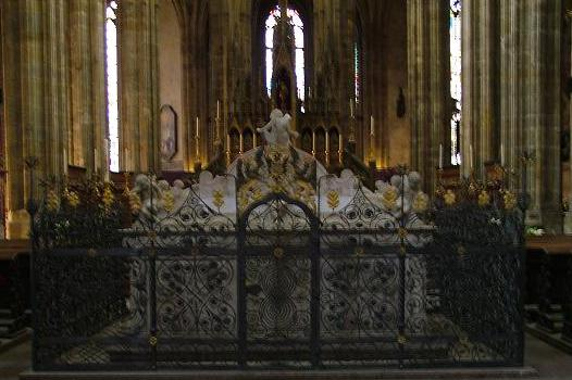 Grabmal von Kaiser Ferdinand I., seiner Ehefrau Anna und des Kaisers Maximilian II. im Veitsdom auf der Prager Burg.